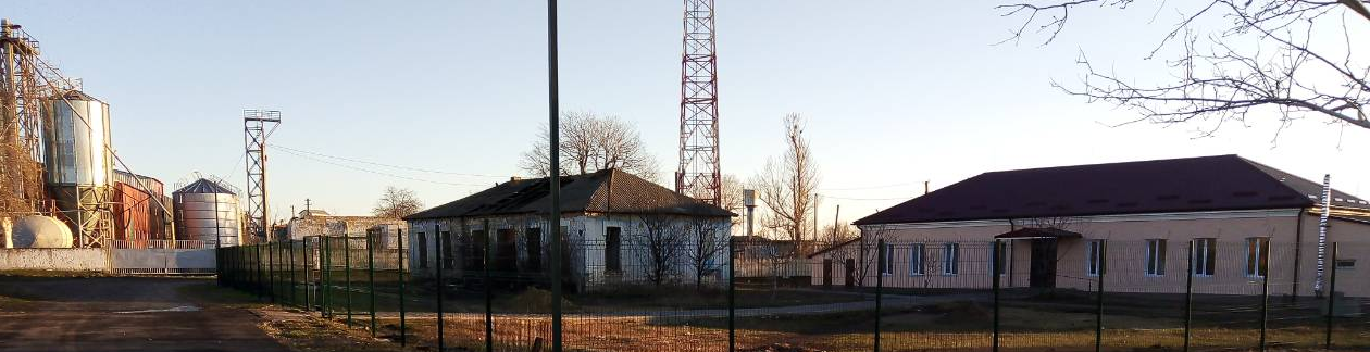 Суворова, Затишшя